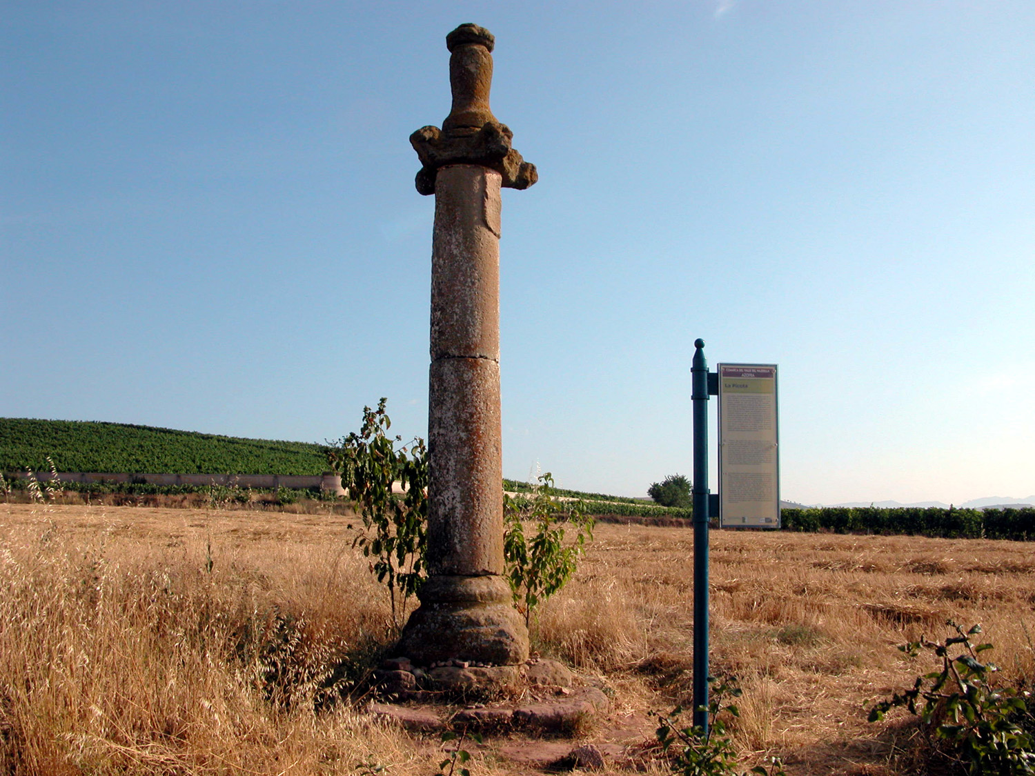 La Picota de Azofra, La Rioja - España.